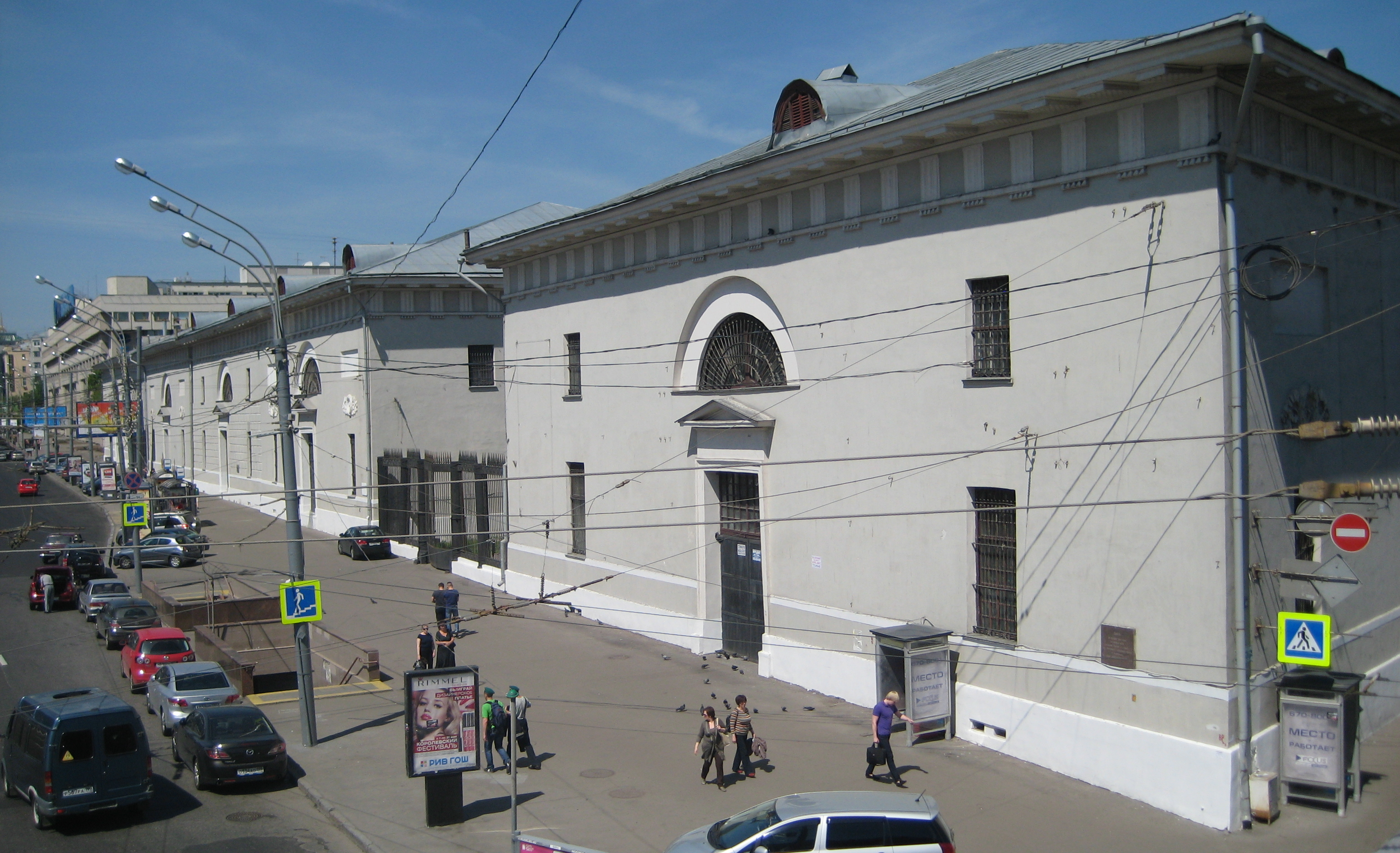 Провиантские склады.